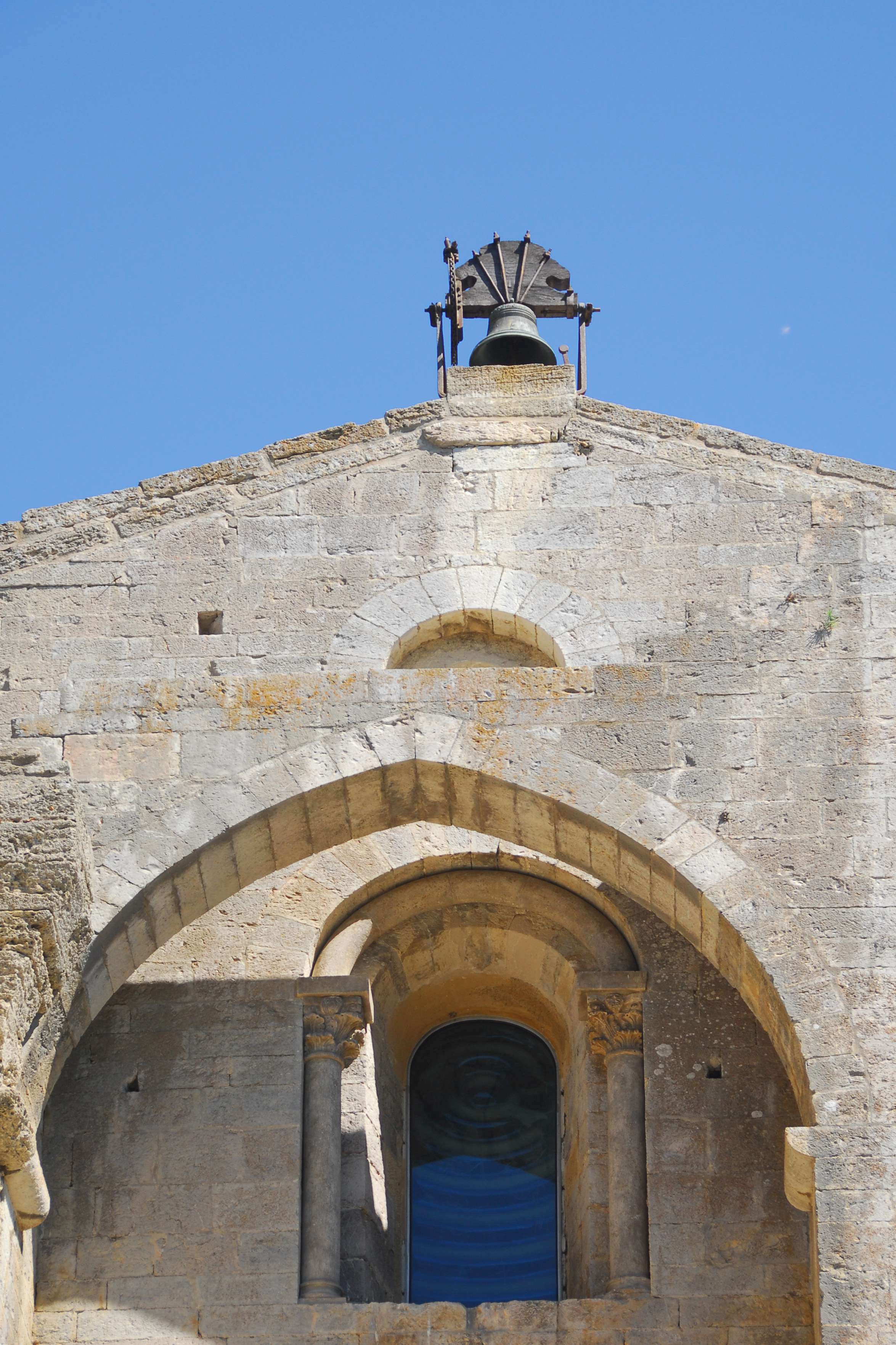 St-Pierre-et-St-Paul de Maguelone, Giebelfirst der Fassade